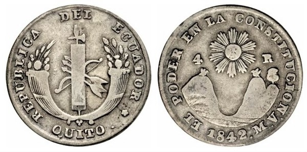 4 reales